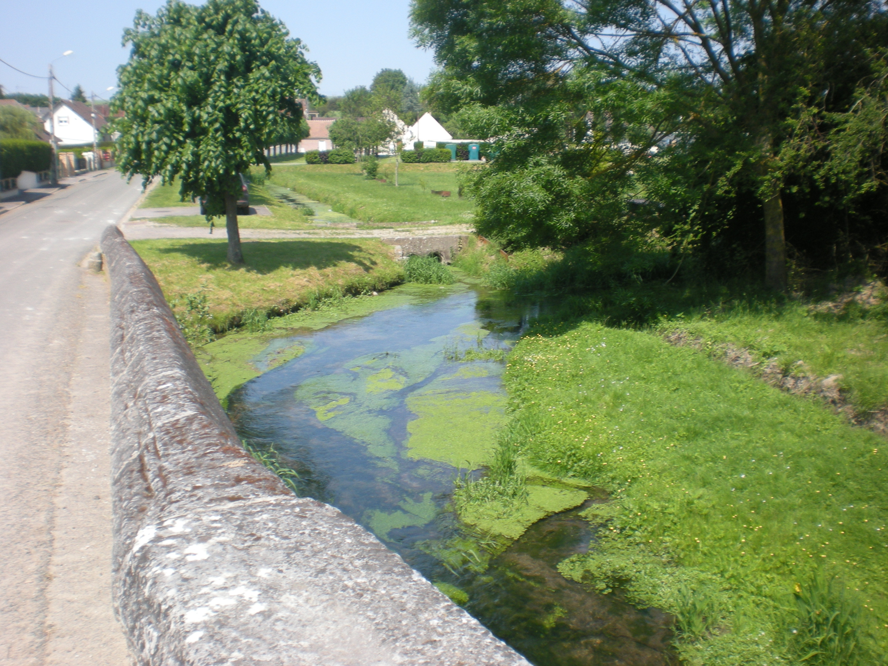 L'Arré à Airion (Oise).